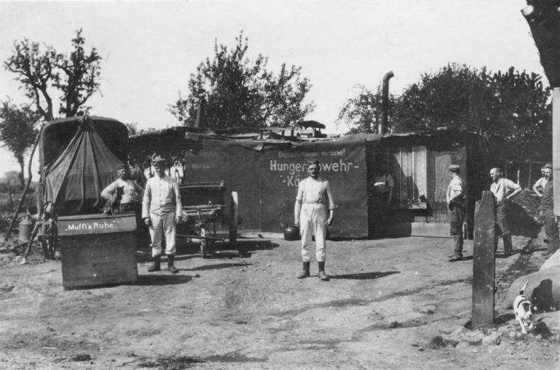 Feldküche